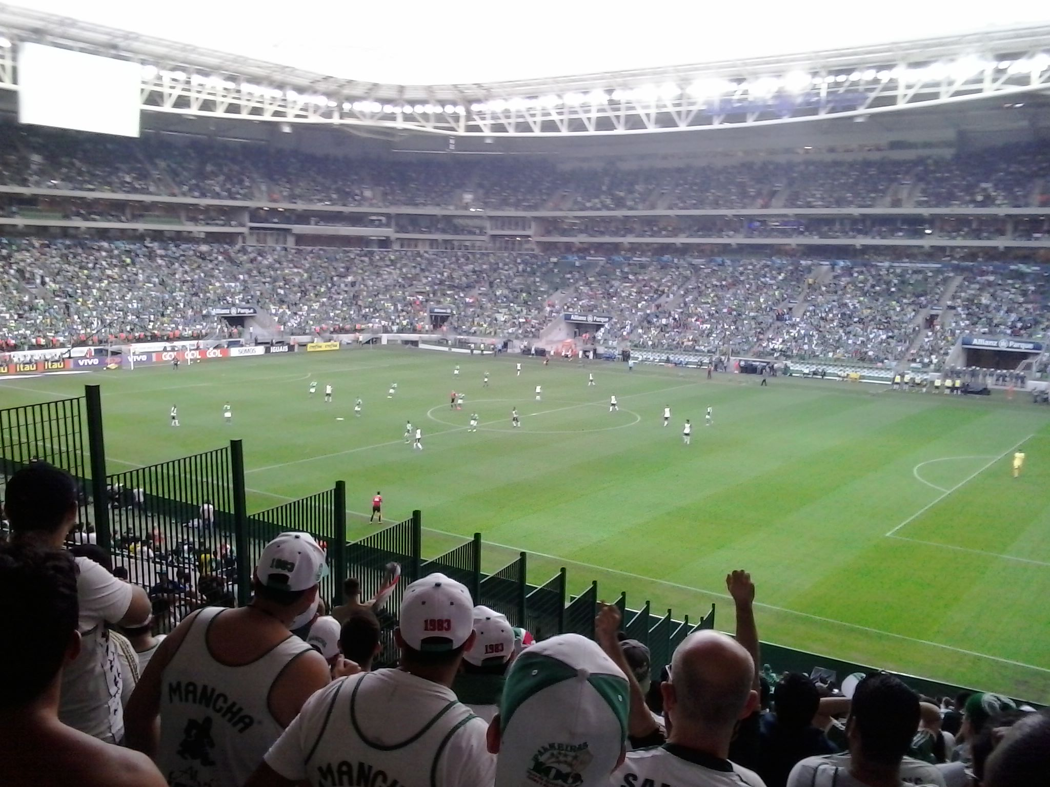 Equipes do Palmeiras e do Corinthians em partida disputada no Allianz Parque no Campeonato Brasileiro de 2015